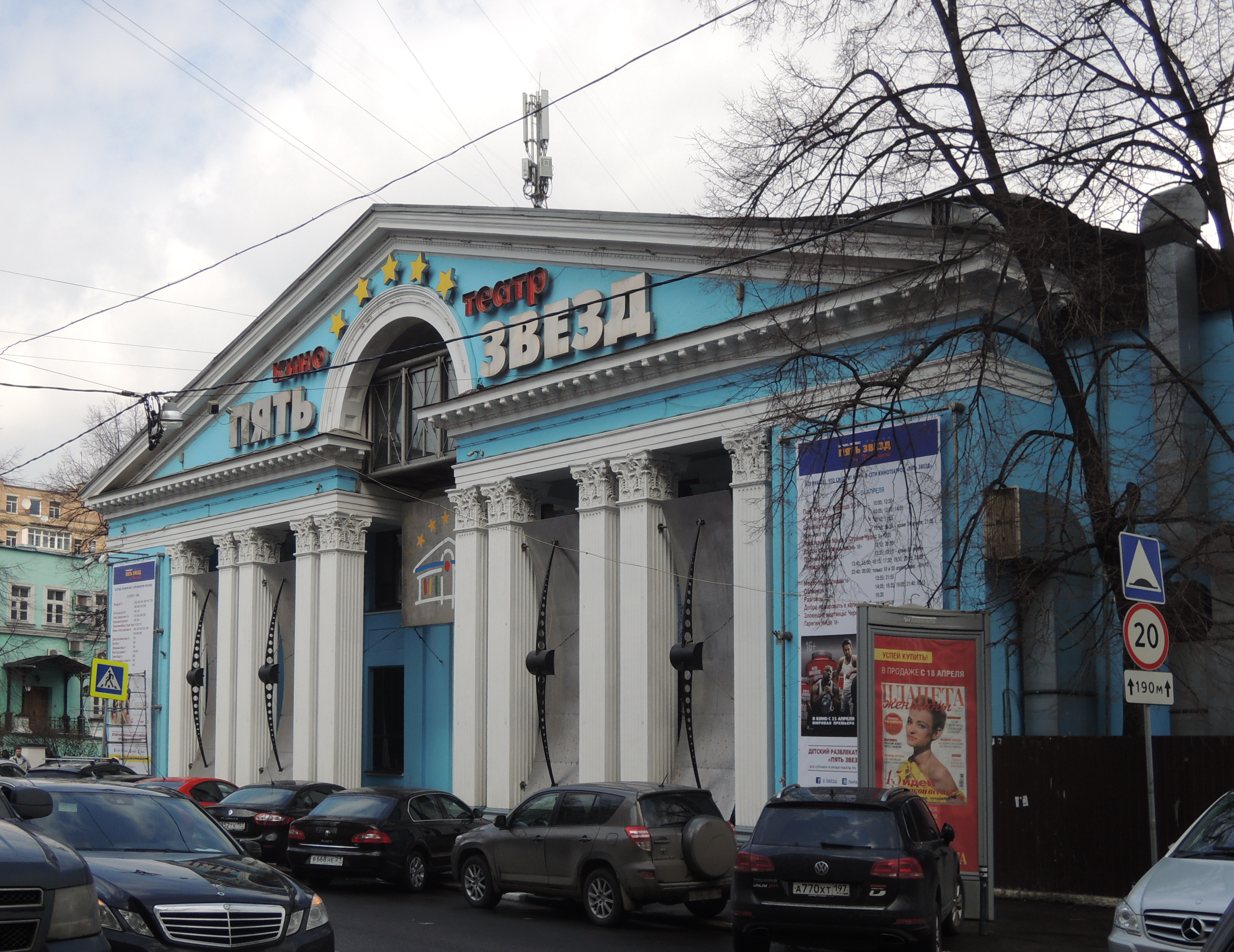 ул. Бахрушина